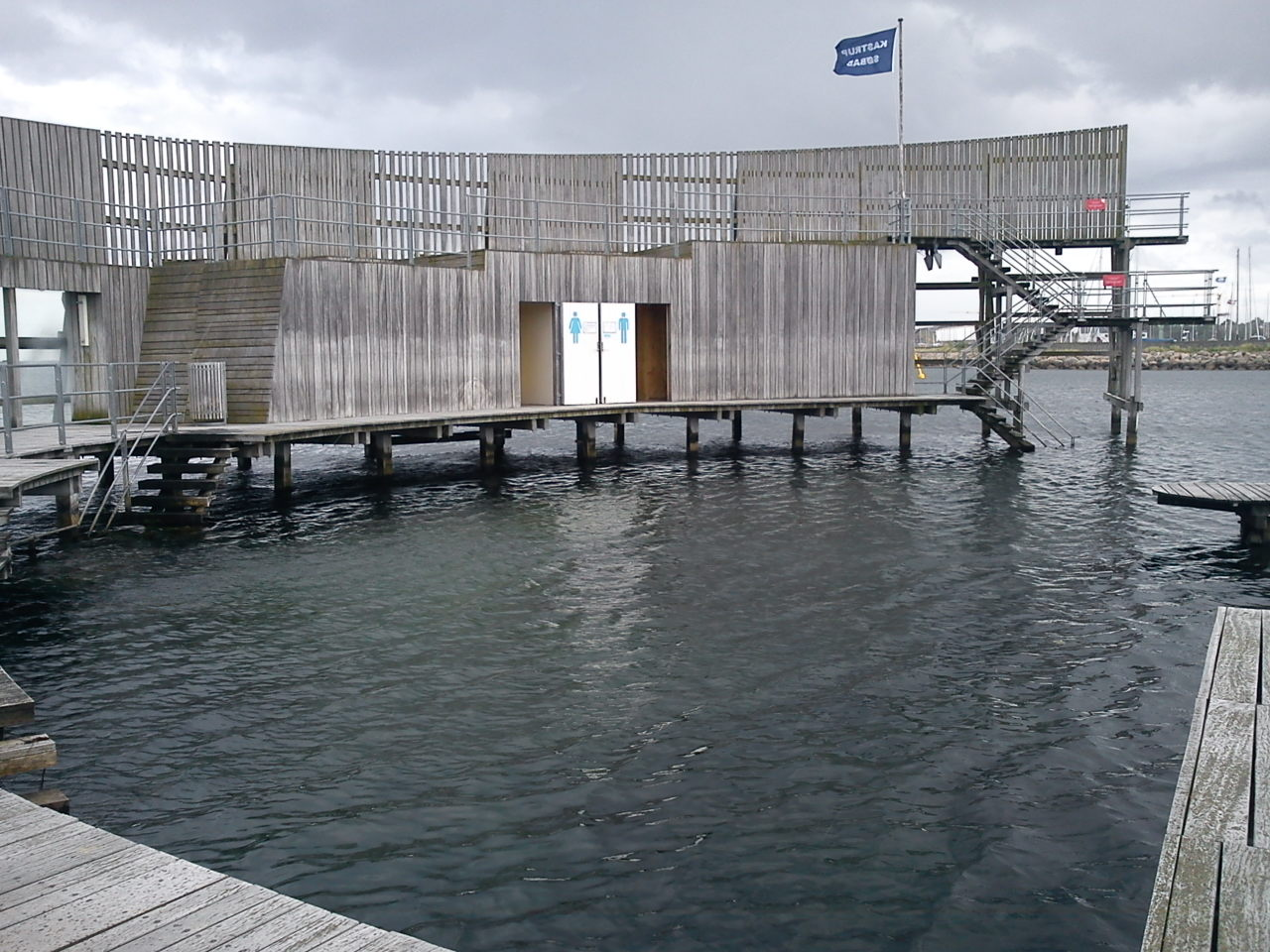 Kastrup Søbad. Søbadet med omklædningsrum og toiletter, er handicapvenligt.